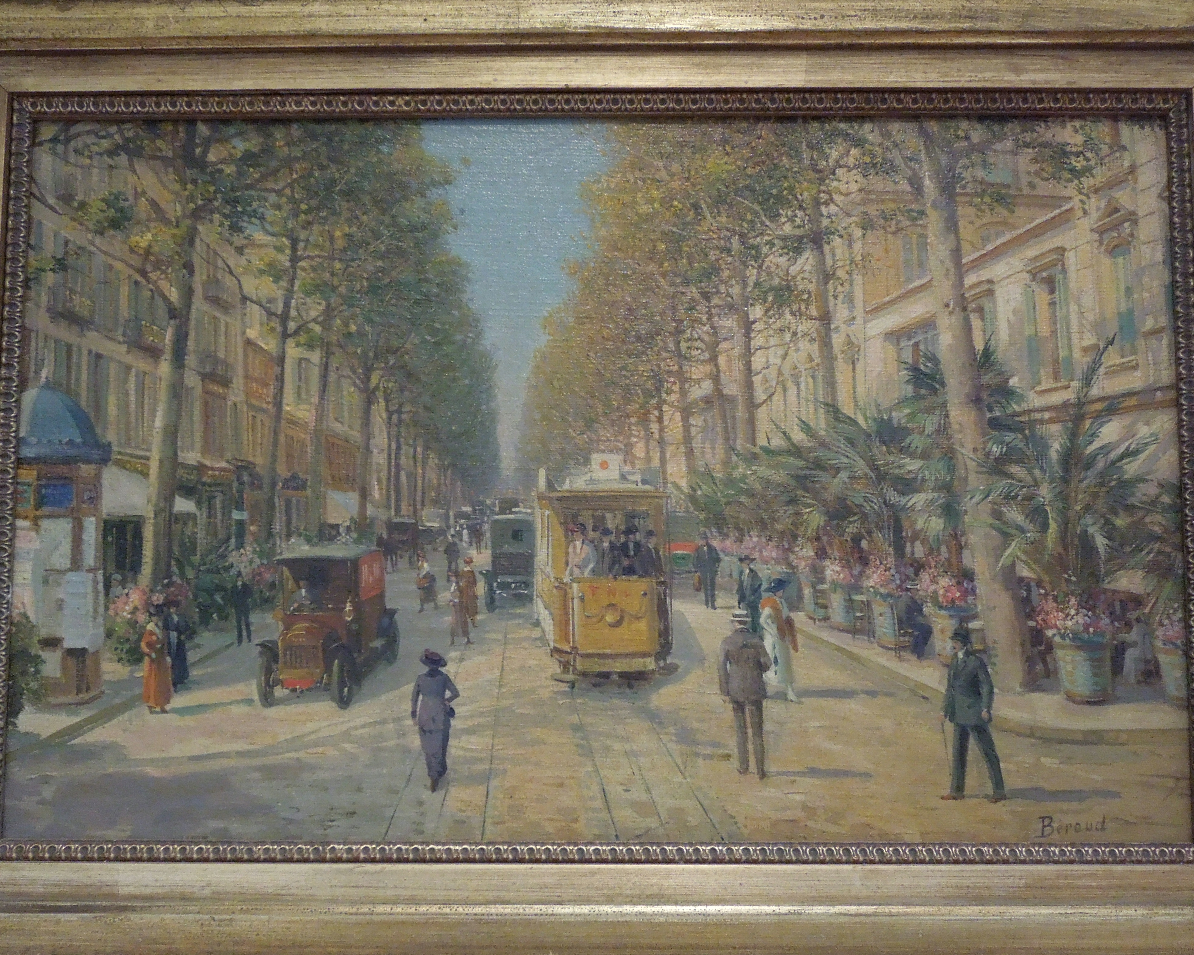 Nice (Alpes-Maritimes, France), sur la promenade des Anglais, la Villa (palais plutôt) Masséna, siège du musée du même nom. L'avenue de la gare à Nice, par Louis Béroud, musée Masséna, Nice.